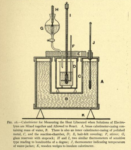 Calorimetro